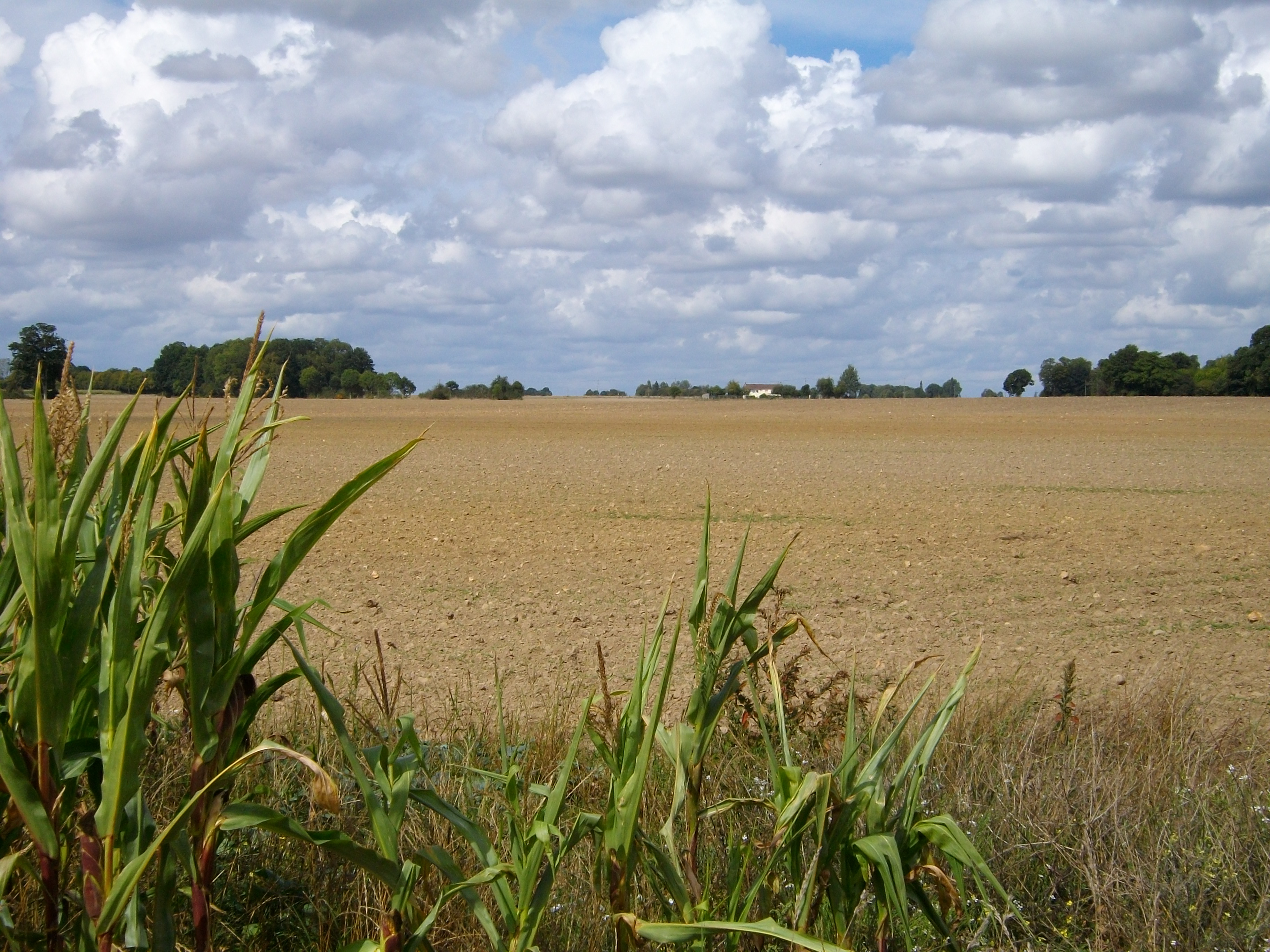 Paysage de Granchain typique du Pays d'Ouche